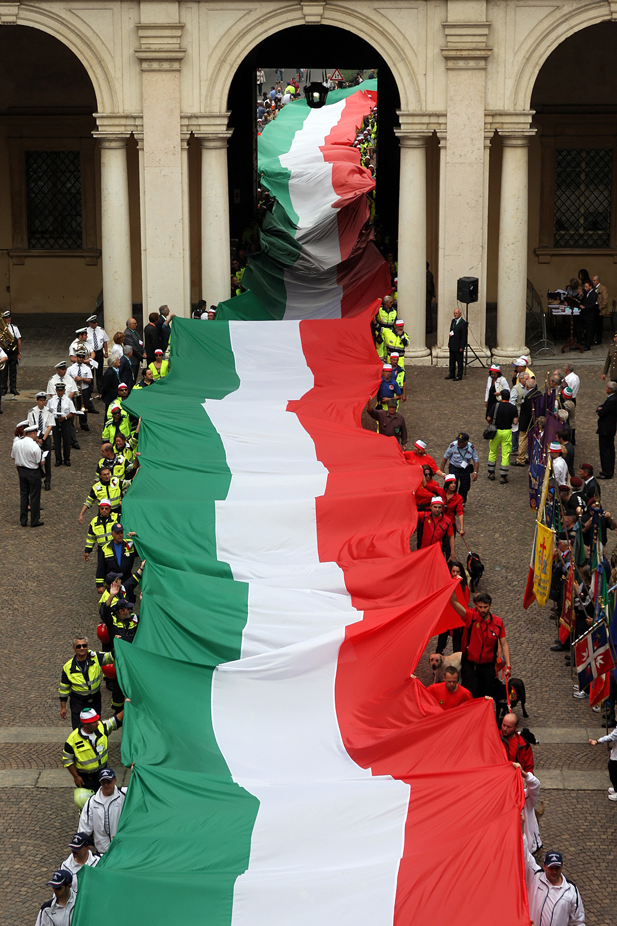 Modena, 2 giugno 2011